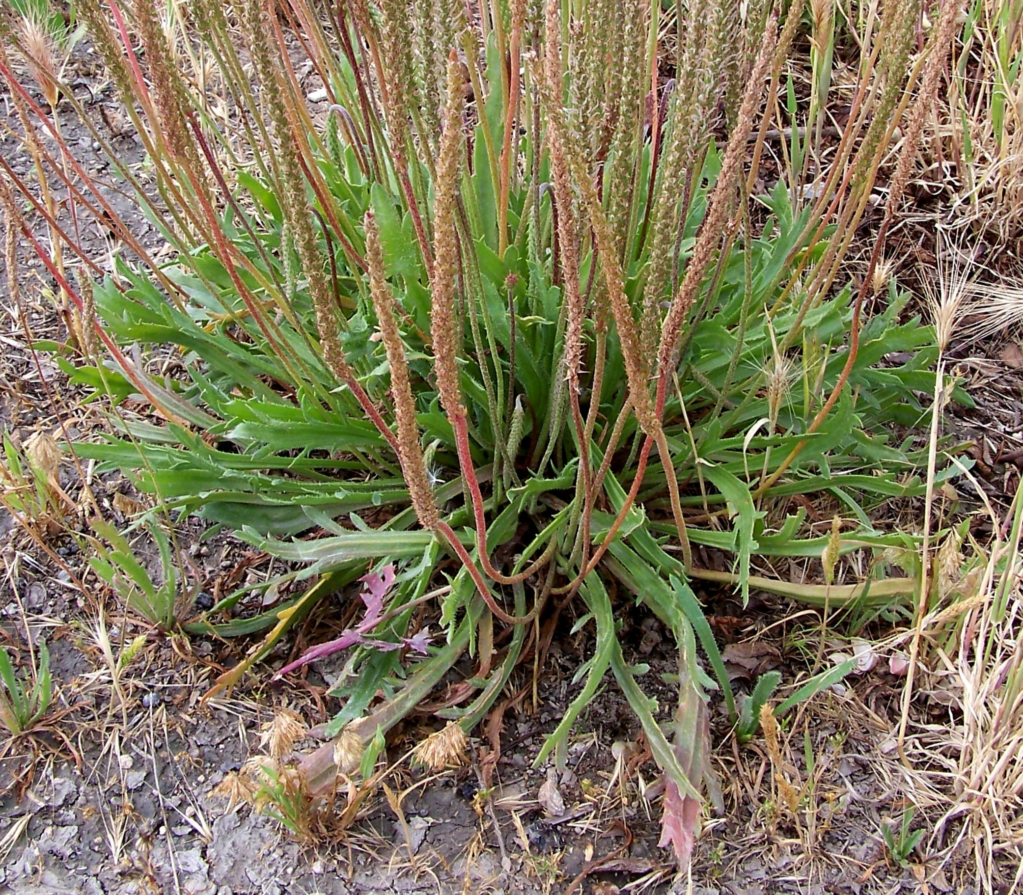 Plantago coronopus (Estrellas): Roseta basal y escapes en espiga - Camino del Cabezo de los Ojales, circa cruce del Camino de San Isidro, Albatera (Provincia de Alicante, España).